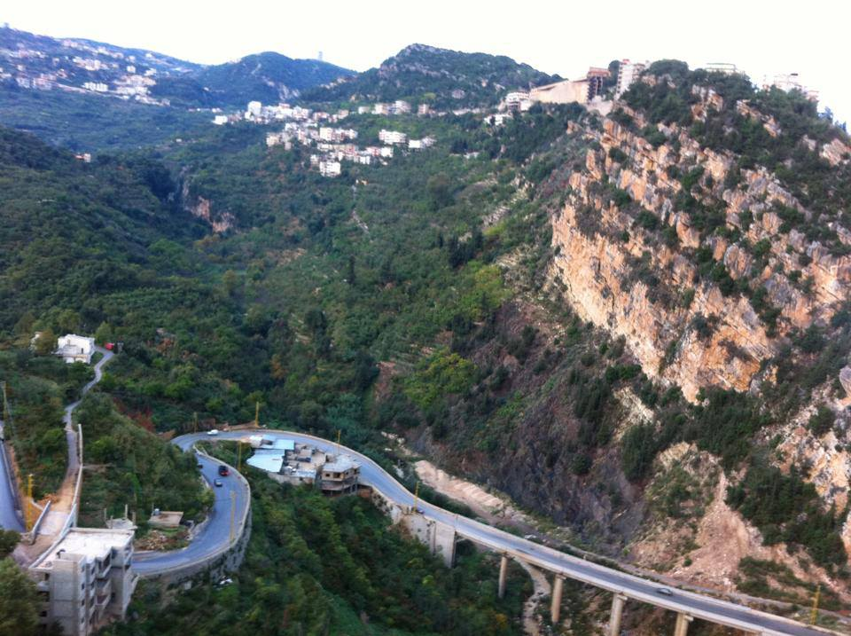 صورة مأخوذة من قرية طاران في الضنية ويظهر فيها جسر طاران إضافةً إلى قرى سير وبخعون